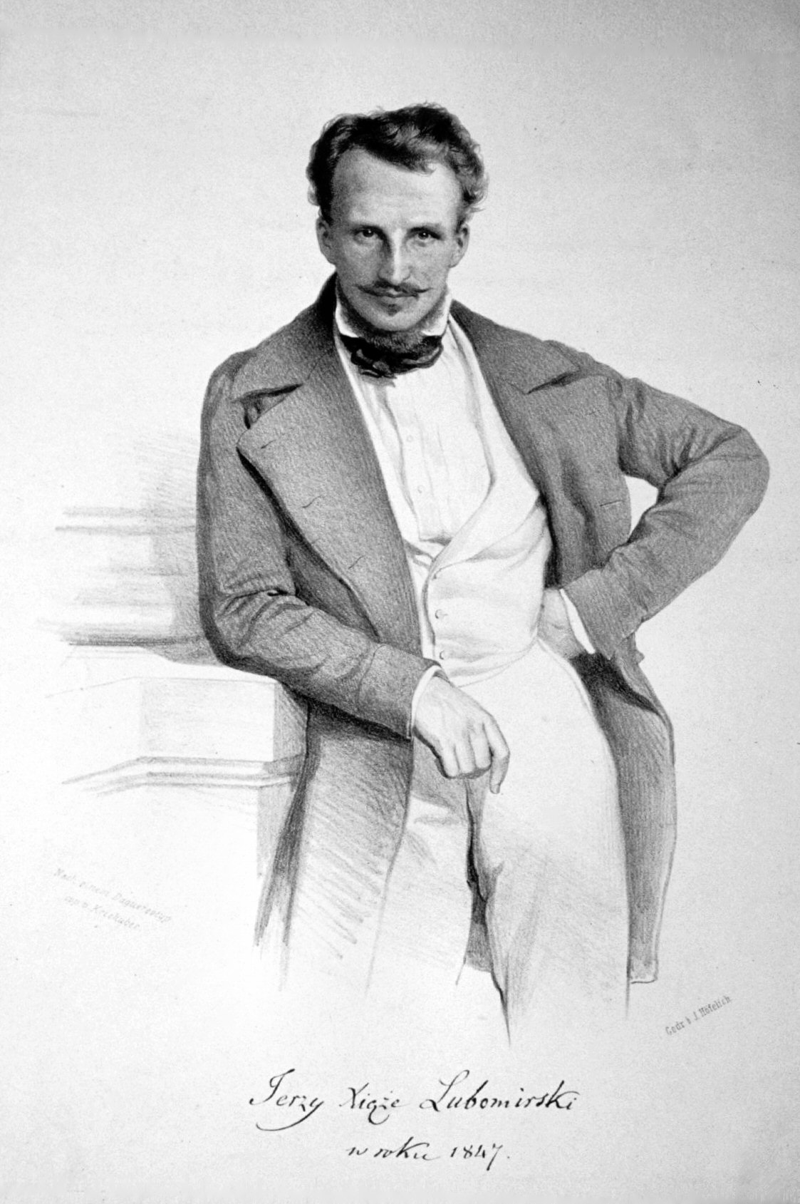 Georg Fürst Lubomirski (1817-1872). Lithographie von Josef Kriehuber nach einer Daguereotypie, 1847